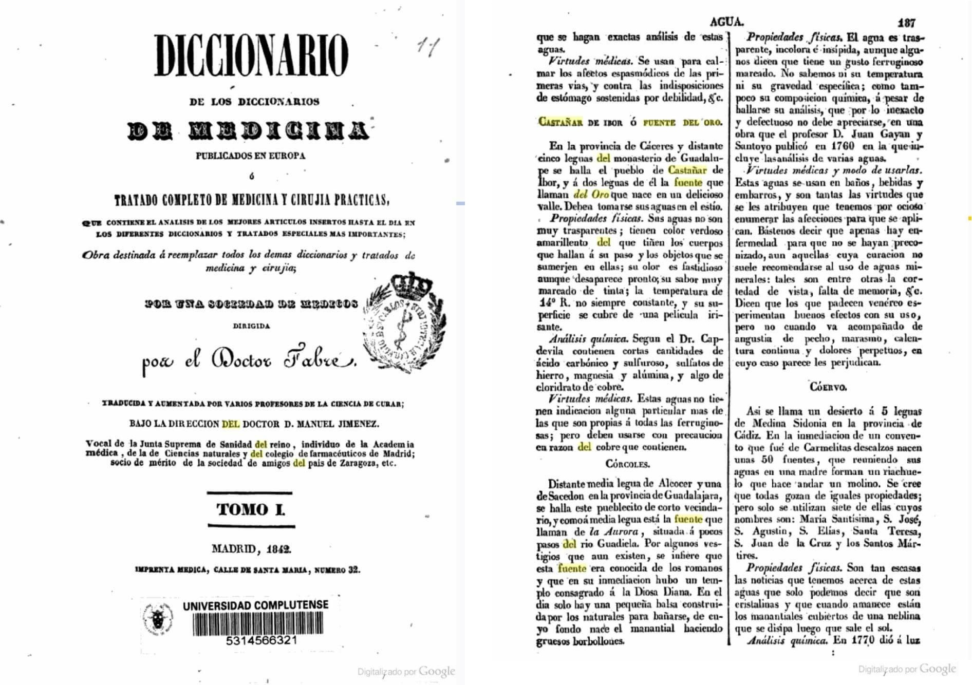 Descripción aguas Fuente del Oro - Fuente de Castañar de Ibor - Fuente Santa